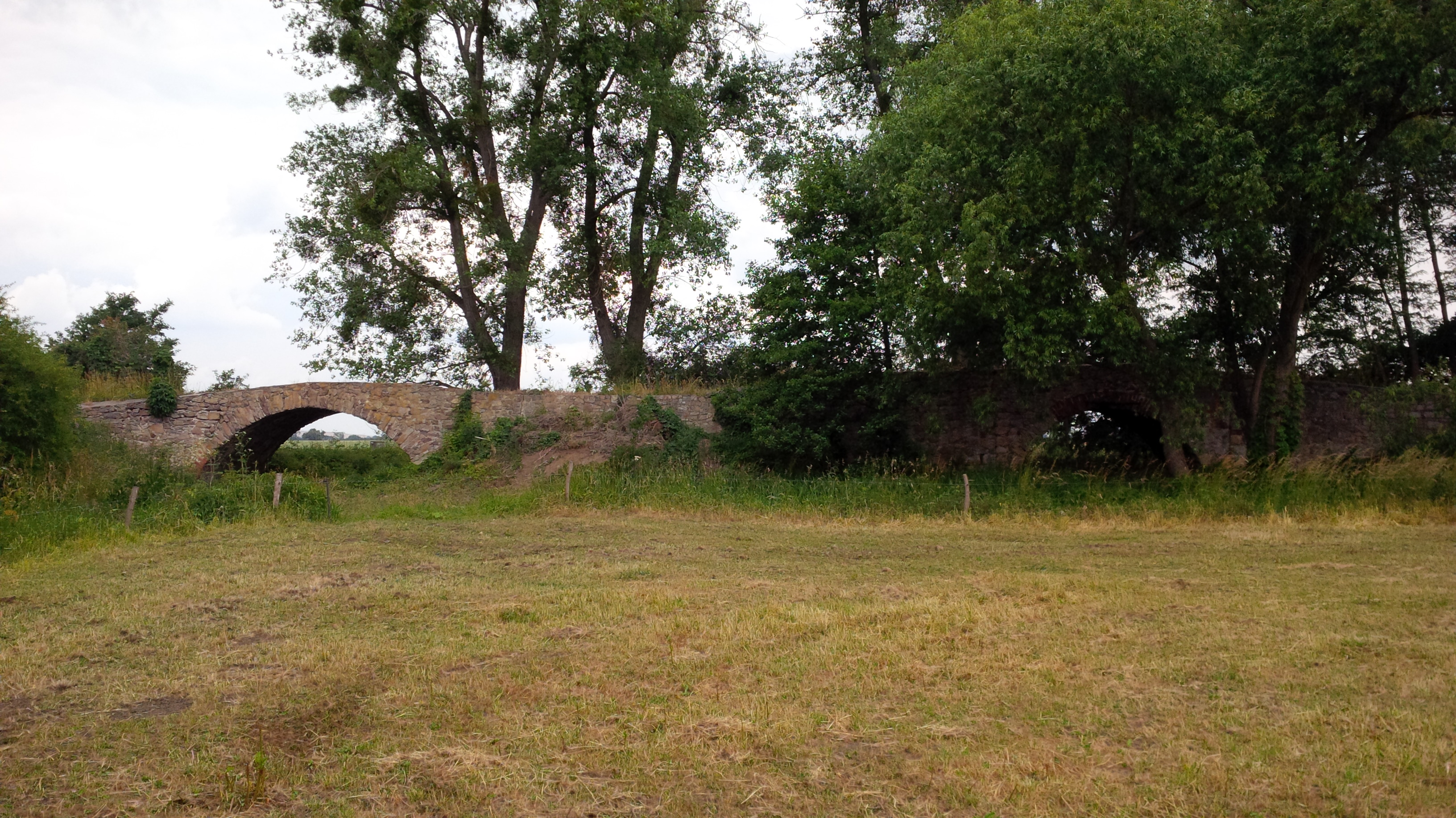 klusbrücke